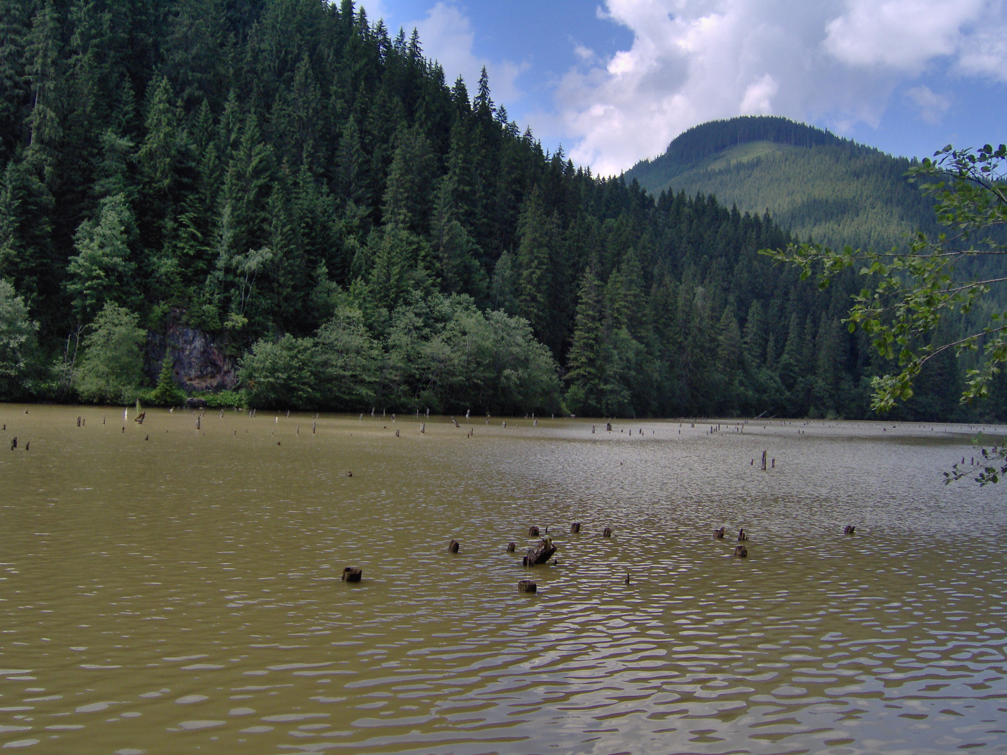 Lacul Roşu